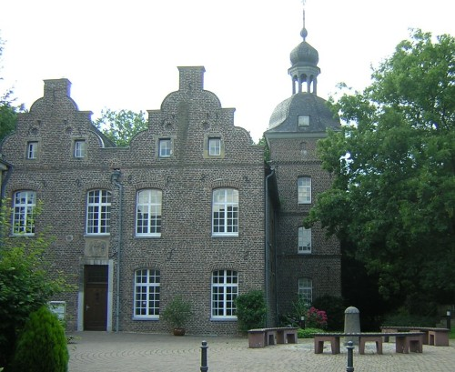 Das Bild zeigt das Haus Hückelhoven in der Stadt Hückelhoven, wo der Gründer der Stadt seinen Wohnsitz hatte.